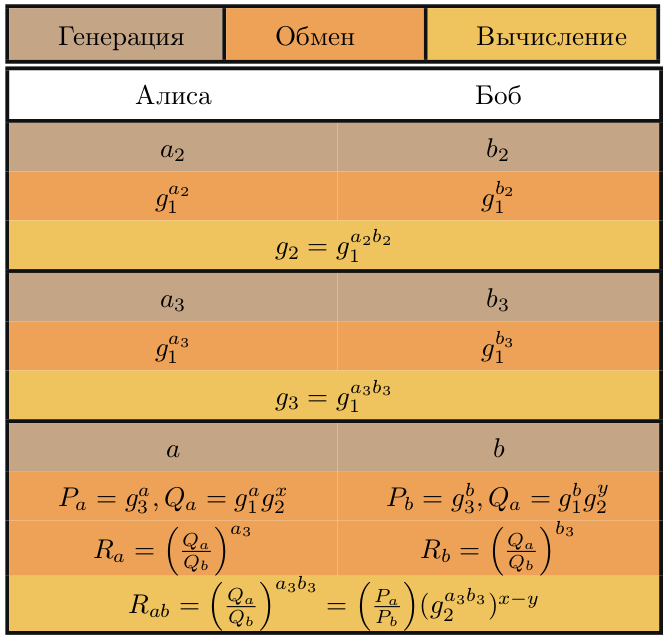 Протокол миллионеров-социалистов в ОТР